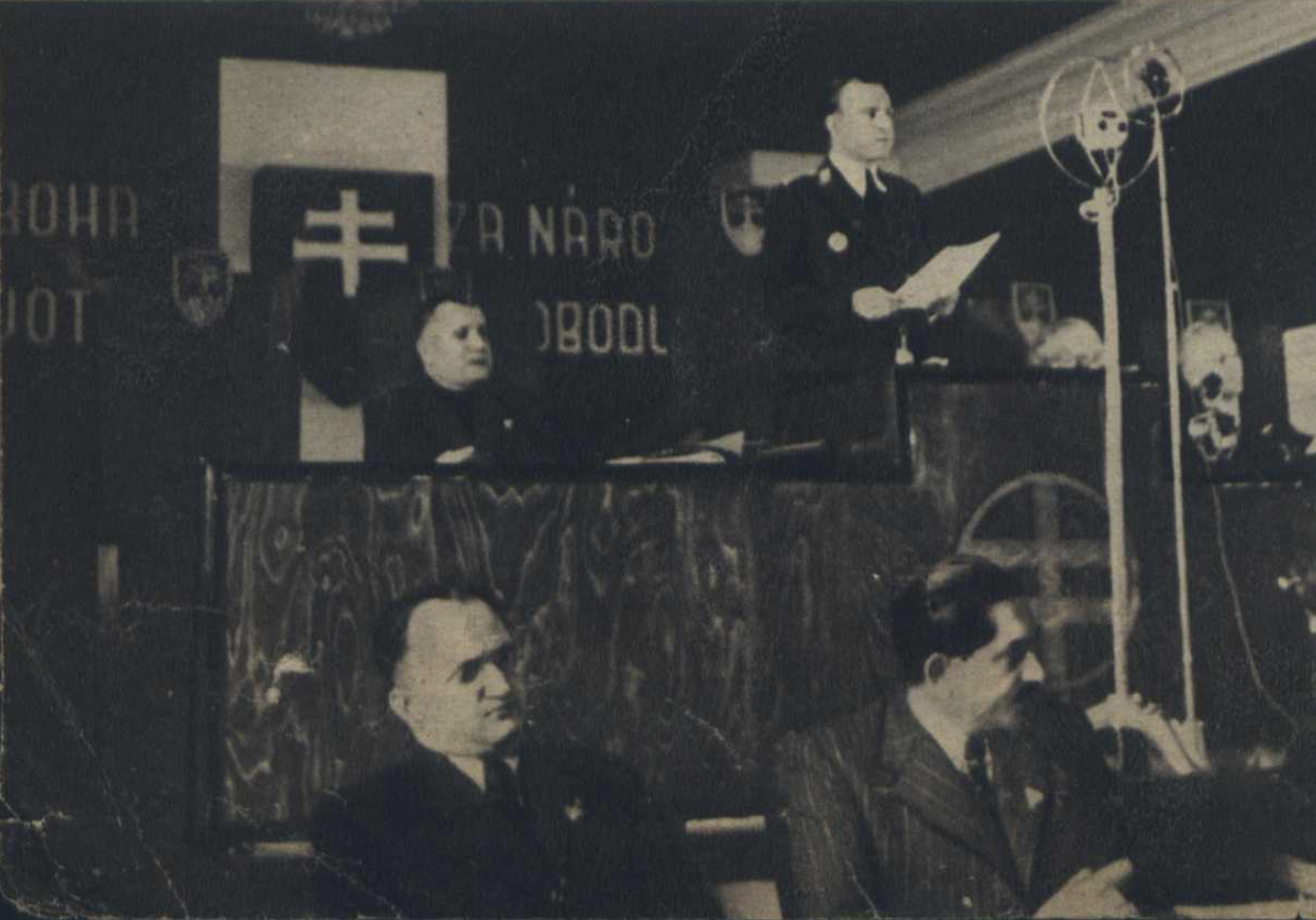 "Generálny tajomník HSĽS dr. Jozef Kirschbaum podáva organizačný referát. Sediaci od ľava: dr. K. Mederly, min. J. Stano a novozvolený podpredseda HSĽS, min. dr. Ďurčanský"